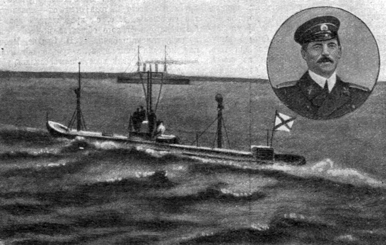 "Камбала" перед столкновением с броненосцем "Ростислав". Наверху справа - портрет минного кондуктора Ф. Сальникова, погибшего на "Камбале"